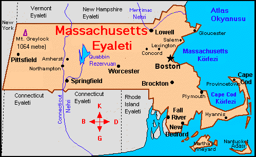 ABD'nin Massachusetts eyaletinin haritası. Bu haritayı çeşitli kaynakları kullanarak ben kendim çizdim. Serbestçe istenildiği gibi kullanılabilir.